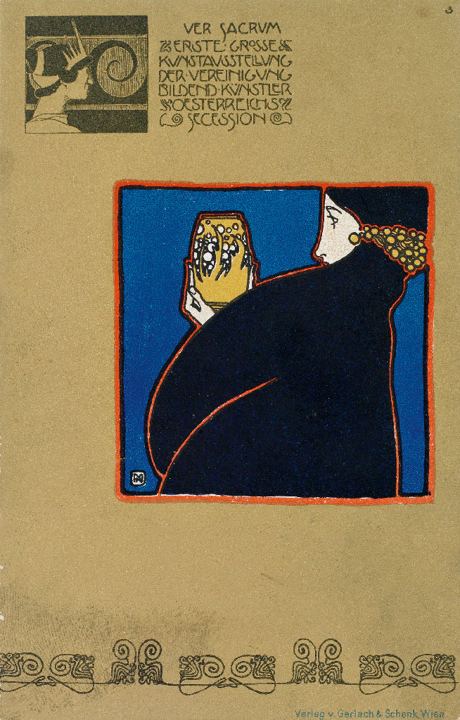 Postkarte VER SACRUM - ERSTE GROSSE KUNSTAUSSTELLUNG DER VEREINIGUNG BILDEND. KÜNSTLER ÖSTERREICHS - SECESSION. Verlag v. Gerlach & Schenk, Wien. Farblithographie, 14 x 8,9 cm